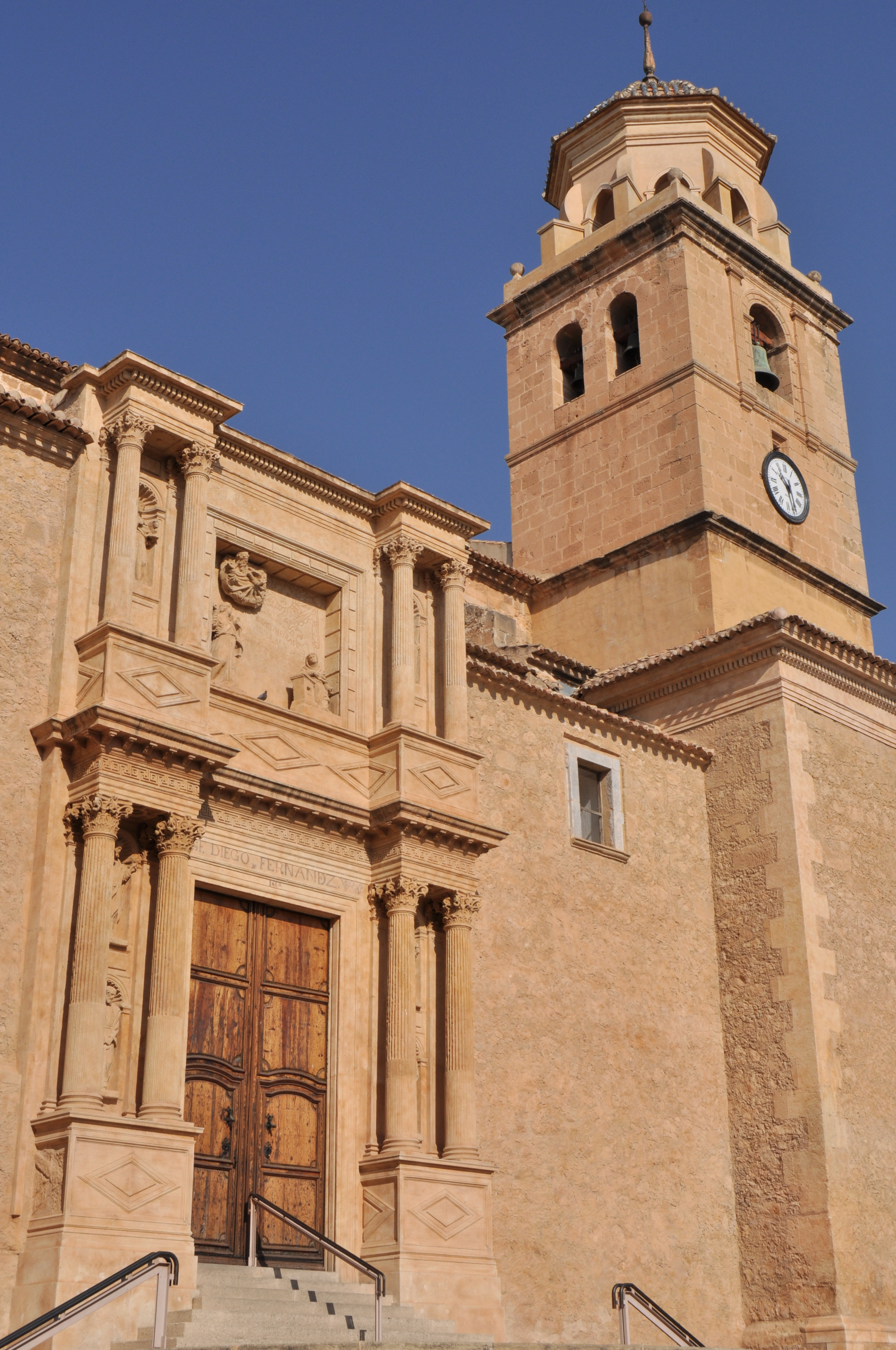 Hellin - 004